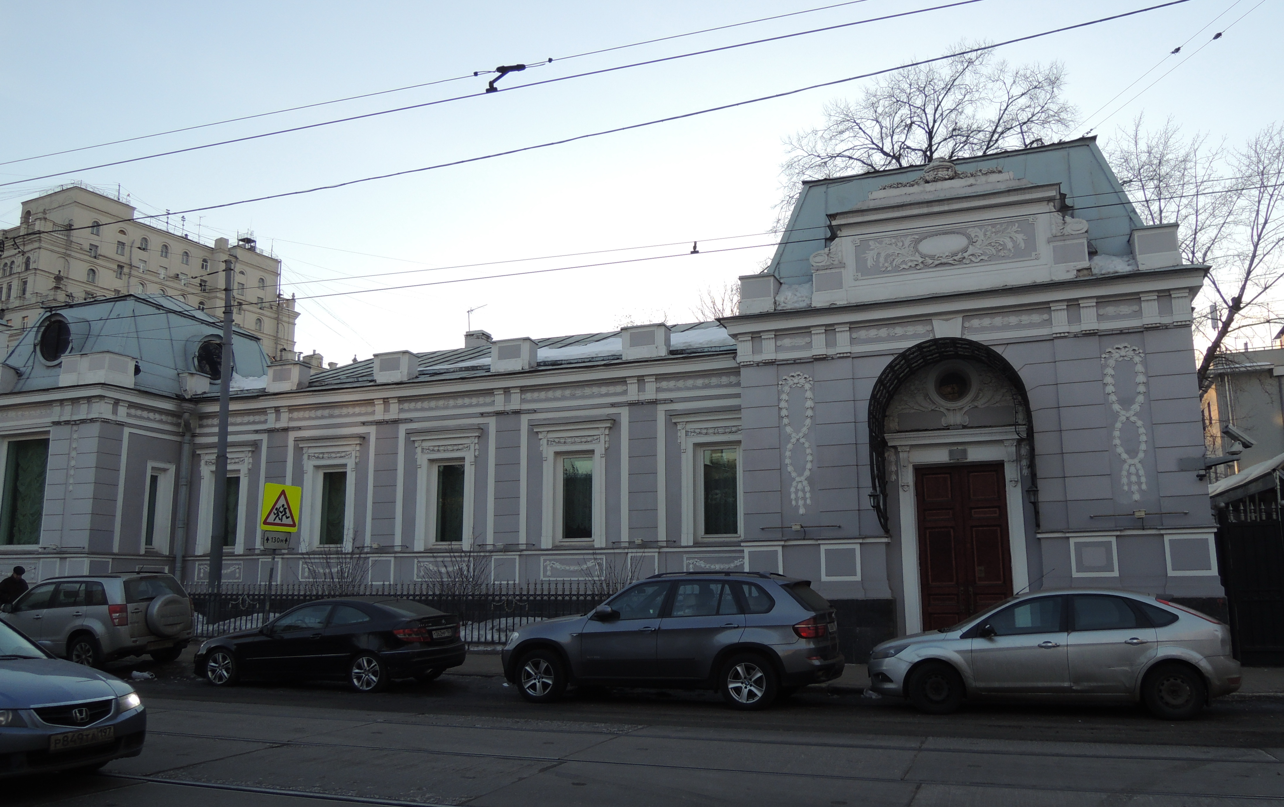 Новокузнецкая улица, 40, Москва